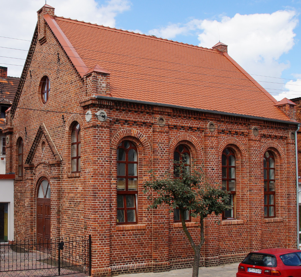 Zdjęcie z 2014r